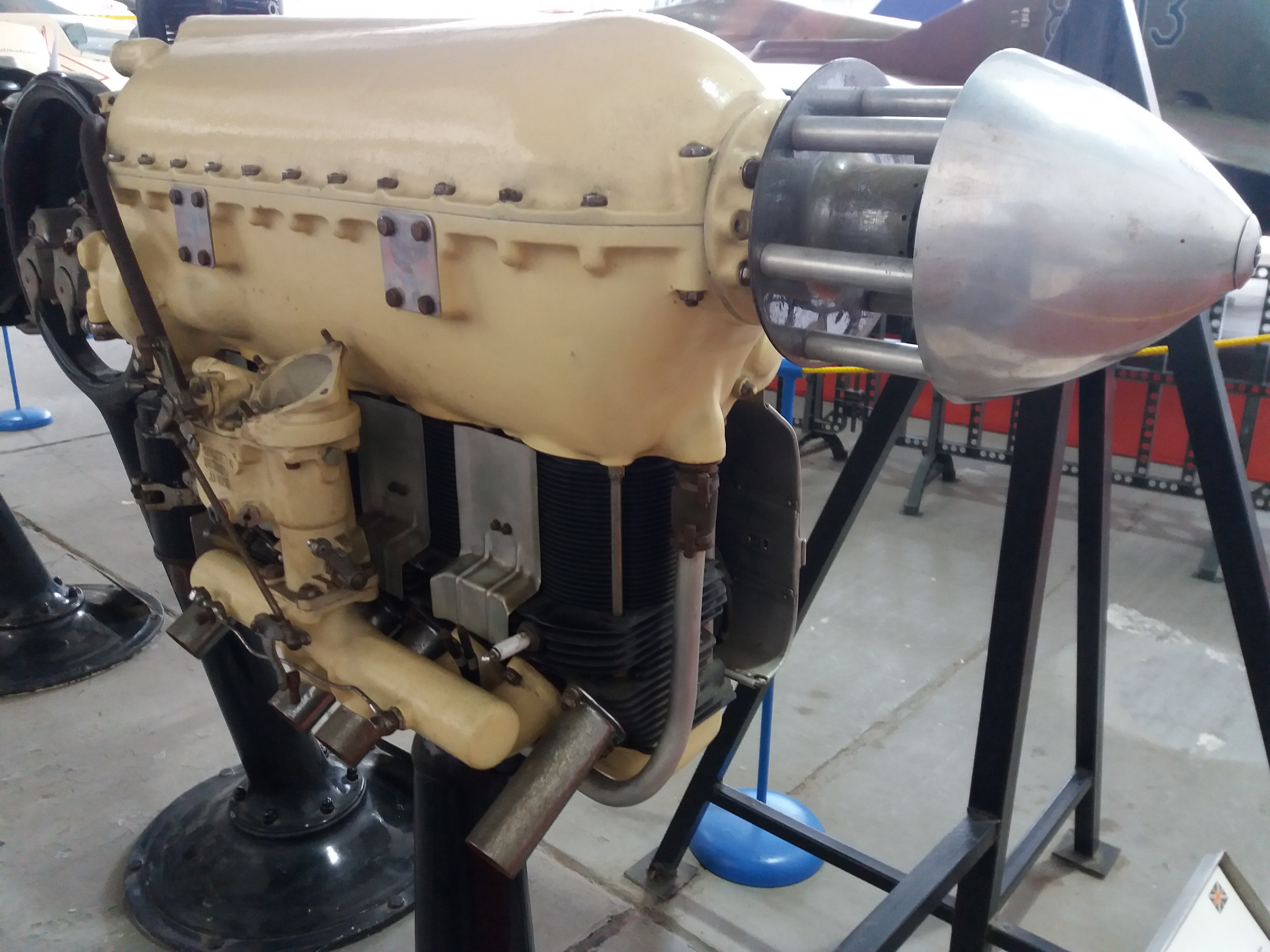 Walter Mikron III (Kbely)